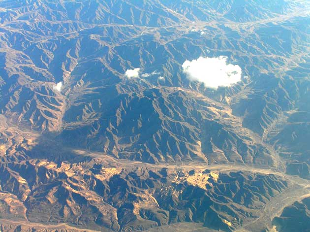 (En): In mongolia (Gobi desert) (Fr): En mongolie (Désert de Gobi)